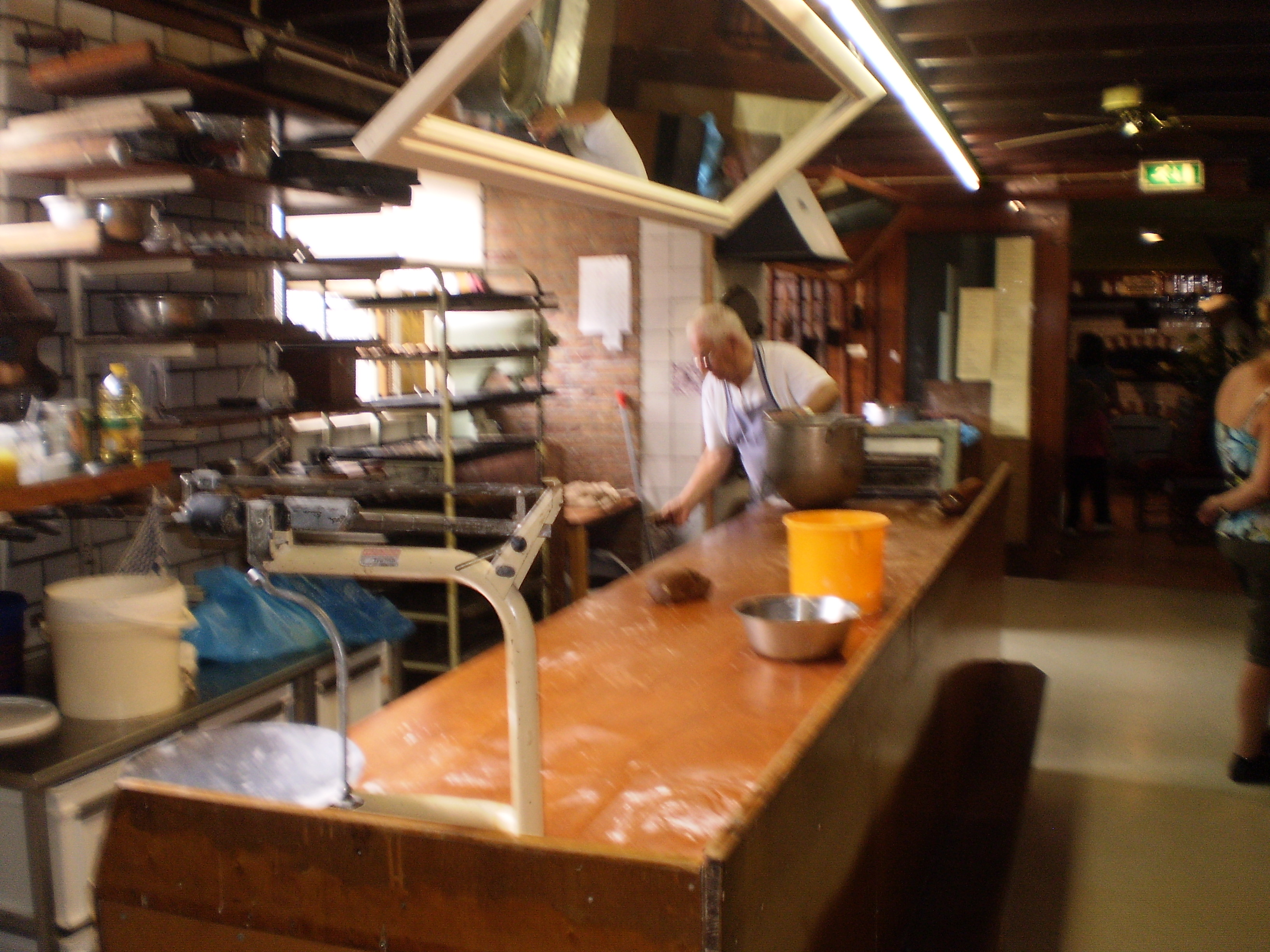 De bakker bakt alle dagen sels bie Bakkerijmuseum De Alde Bakkerij.